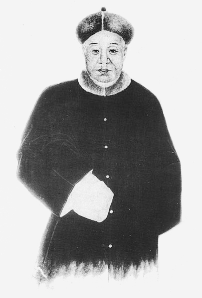 王燮，字襄臣，顺天宁河（今属天津）人 。清代参将，光绪间义和团起，被杀，有《秦园诗钞》。